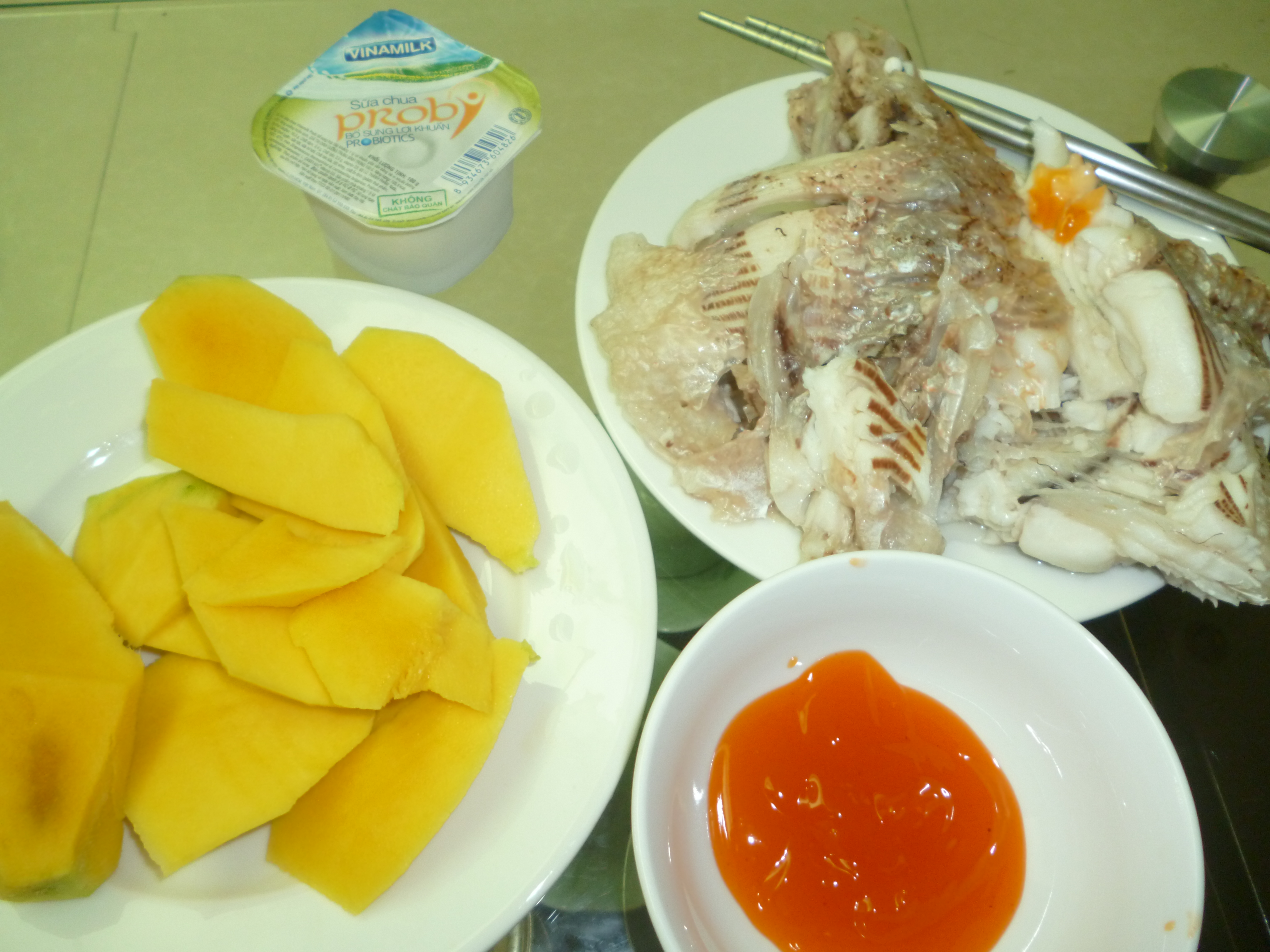 Hình tự chụp về món ăn cá diêu hồng luộc chắm tương ớt và tráng miệng với xoài, thông số kỹ thuật xem bên dưới